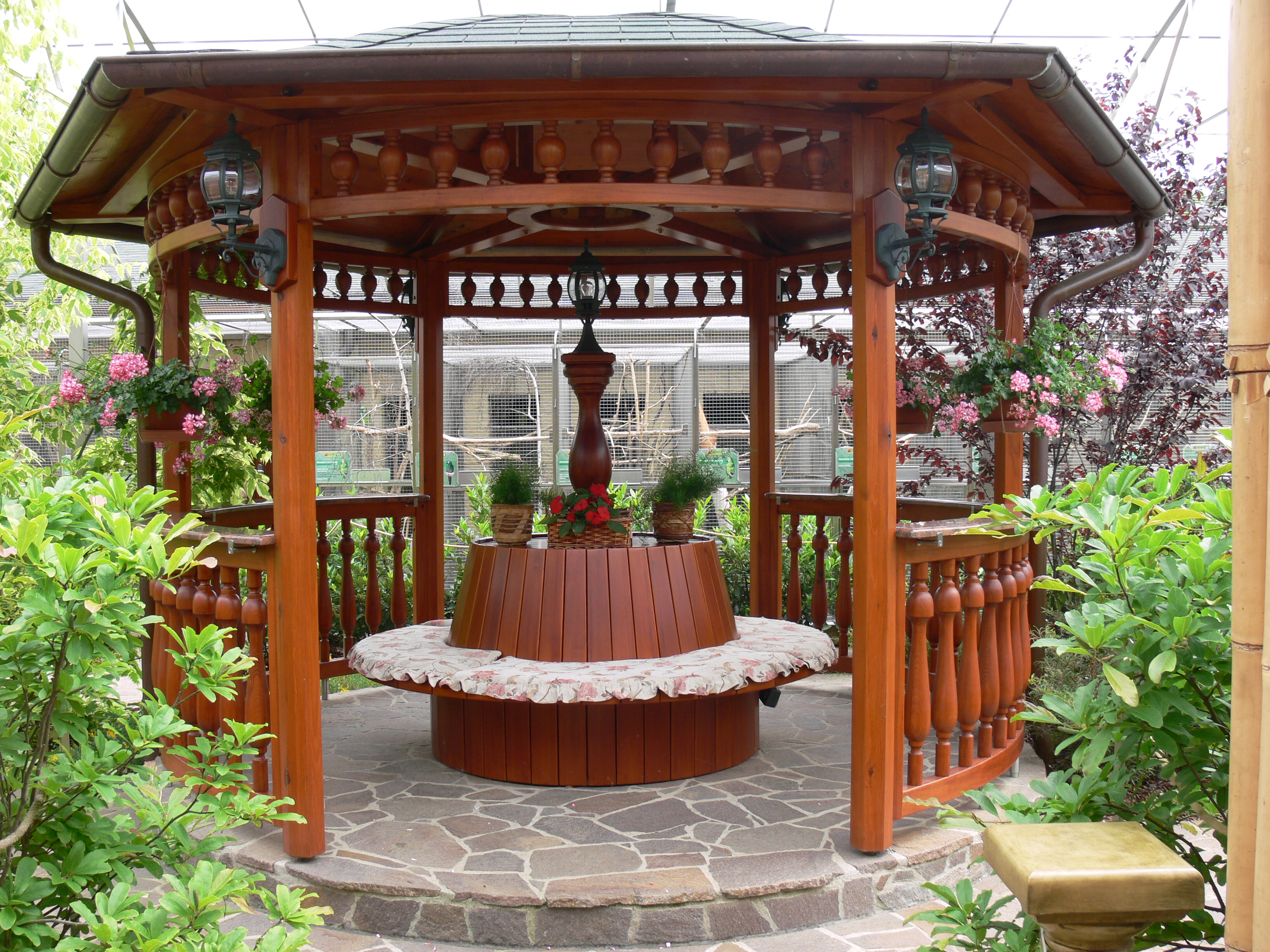 Altán slouží k pozorování papoušků.